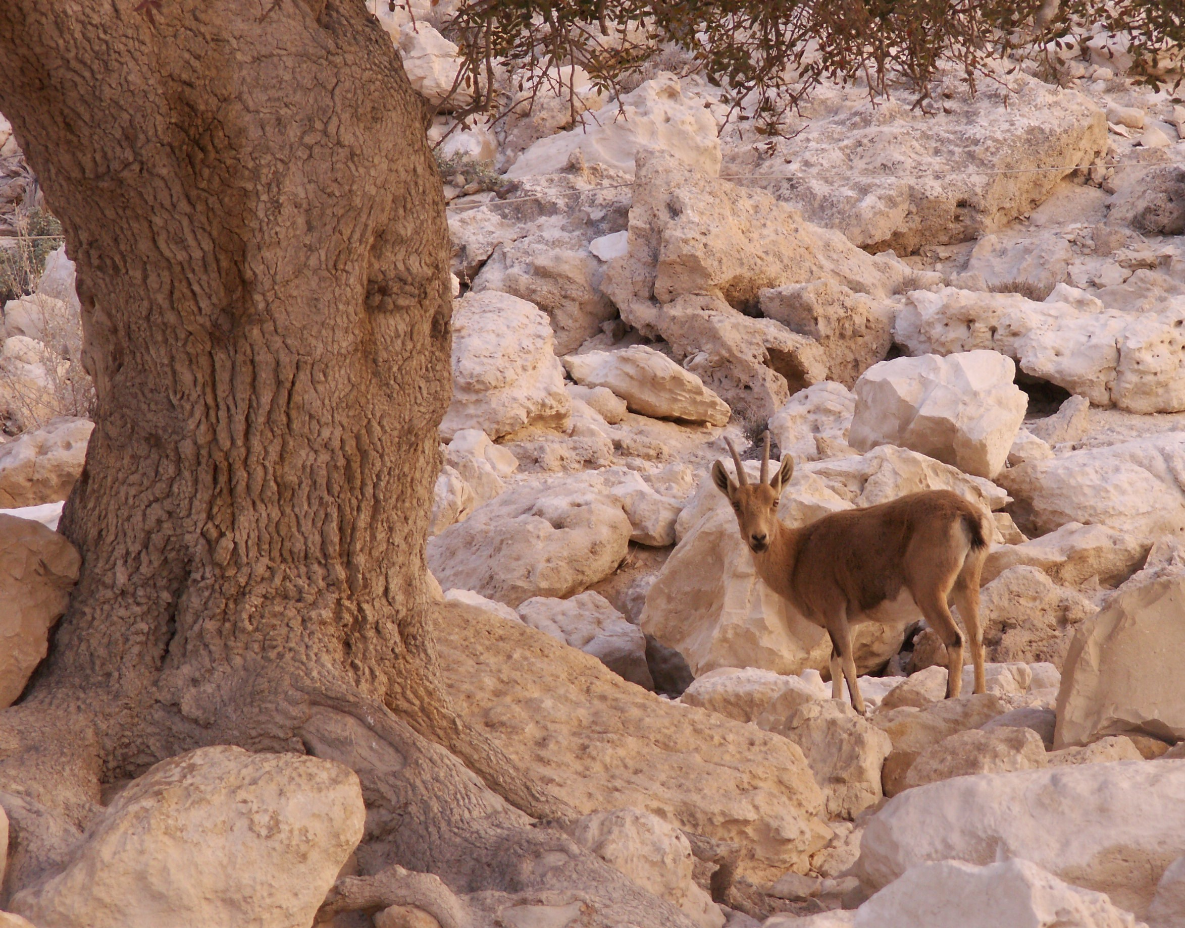 A female Ibex in Ein Avdat